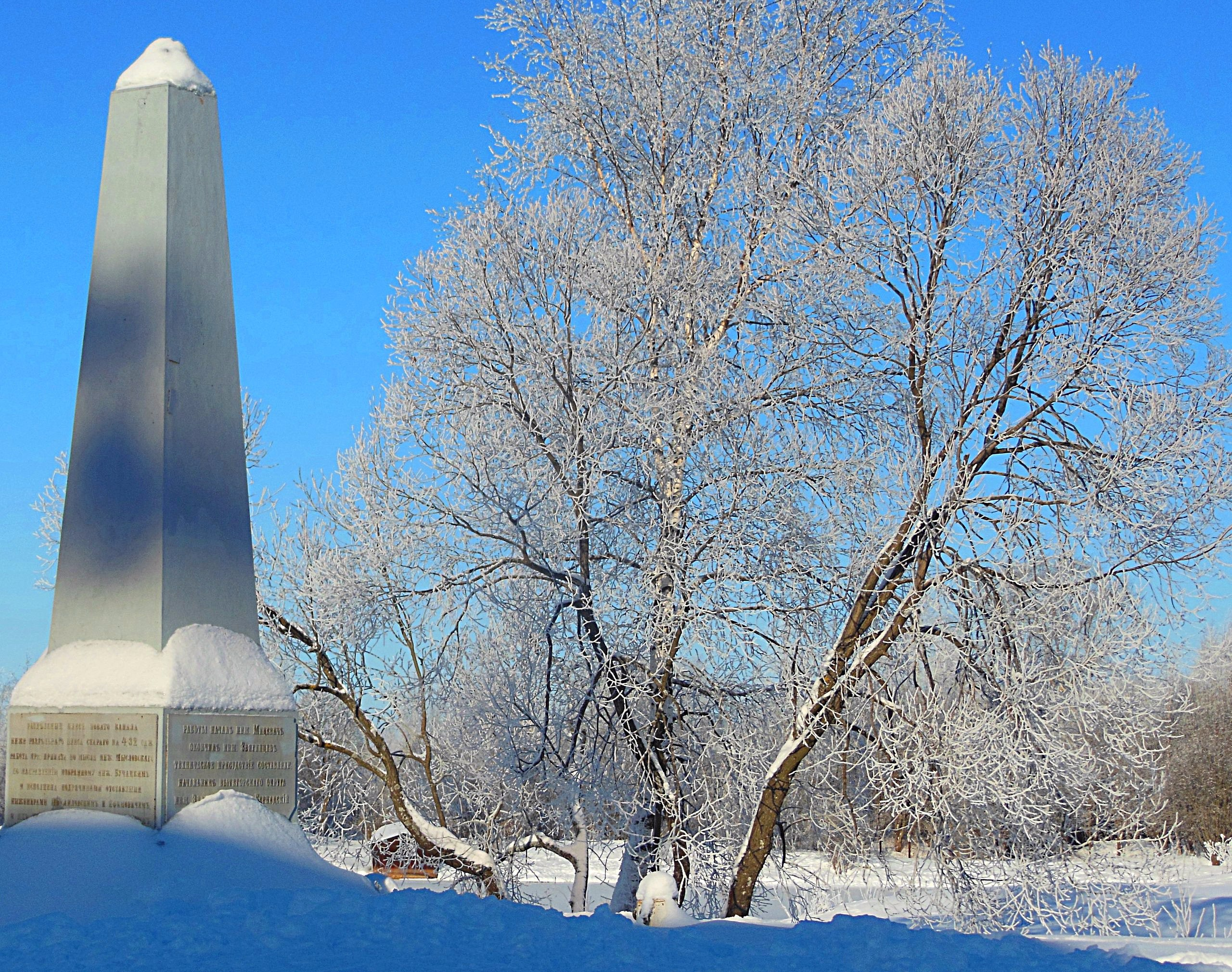 Обелиск на 1-м Мариинском шлюзе: Вытегра, Вытегорский район, Вологодская область